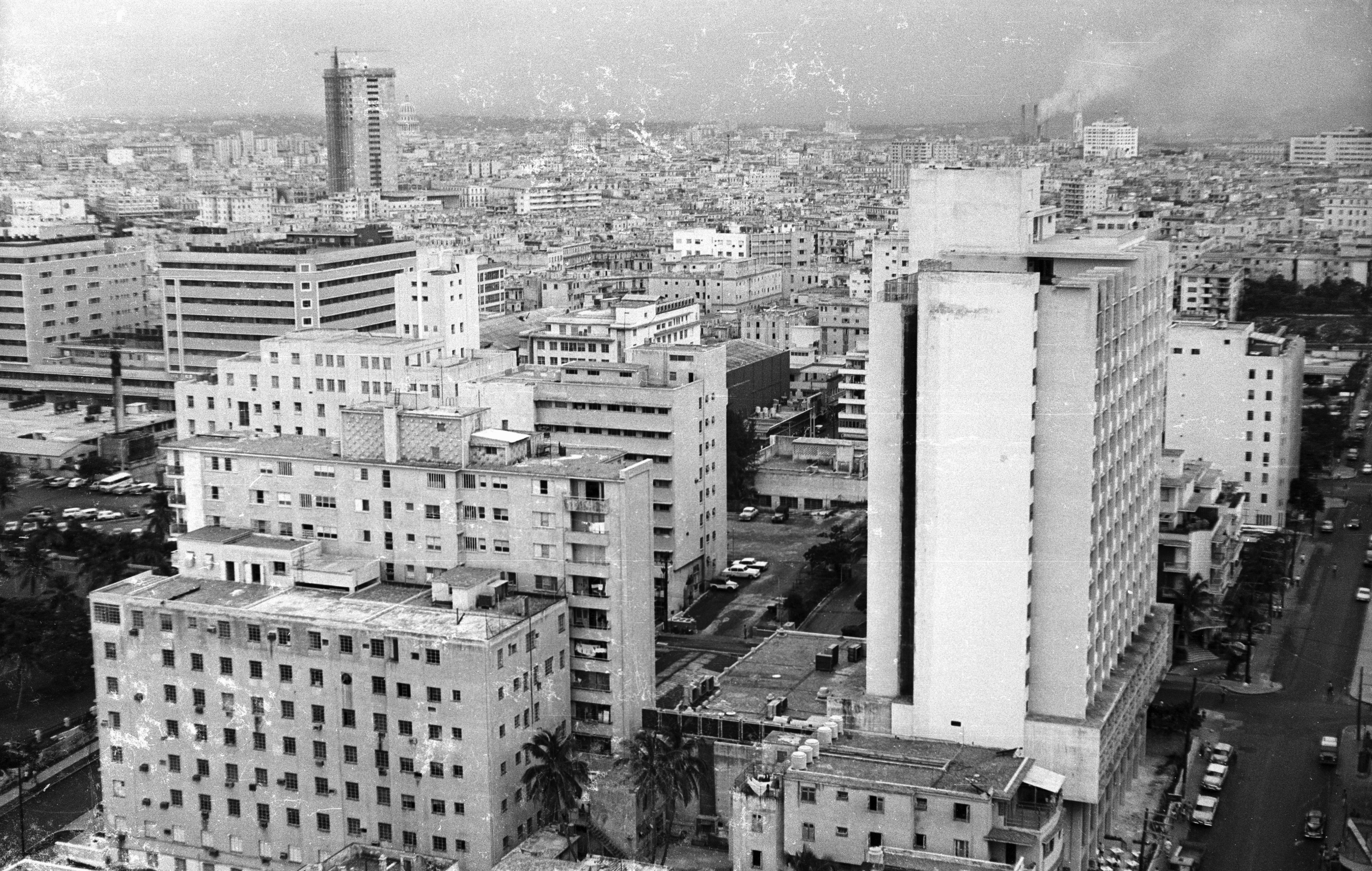 kilátás a FOCSA épületből, jobbra a Calle N és a Hotel Capri. Location: Cuba, La Habana Tags: picture Title: kilátás a FOCSA épületből, jobbra a Calle N és a Hotel Capri.